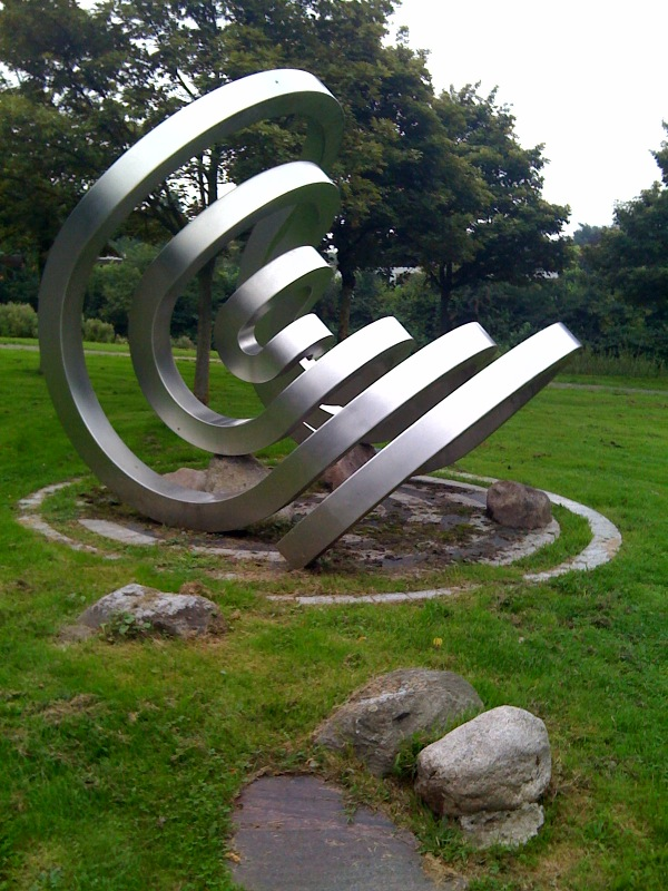 Ruimte uit cirkels Yvonne Kracht (1985) Louis Bouwmeesterlaan/ Prins Hendriklaan, Rijnsweerd, Utrecht